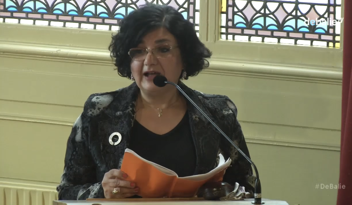 Nahed Selim (ex-moslim, nu katholiek) is geboren in Egypte in 1953. Sinds 1979 woont ze in Nederland en werkt ze als tolk/vertaalster Arabisch. In het verleden was ze publiciste en schreef meerdere boeken die te maken hadden met vrouwen en islam. In 2013 transformeerde ze van een feministische islamcriticus in een conservatieve christen.